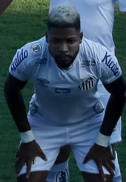 (Santos - SP, 16/11/2019) Partida de futebol Santos e São Paulo na Vila Belmiro. Foto: Isac Nóbrega/PR